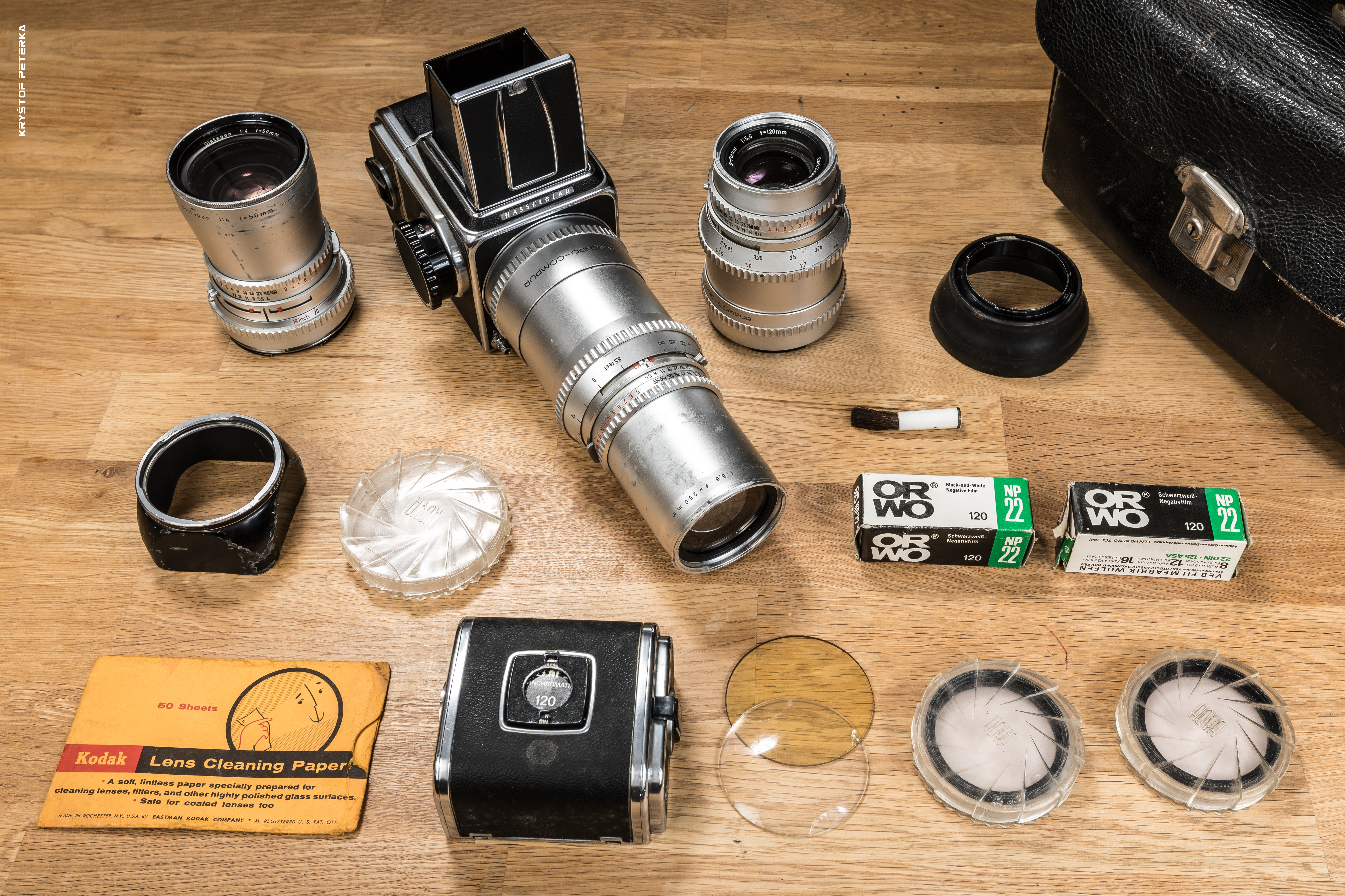 NASA používala při cestách na Měsíc fotoaparát Hasselblad. Mise Apollo vždy měla za úkol dovézt zpět 25 kg vzorků kamení, vybavení v této hmotnosti tedy zanechávala na povrchu. Mezi lety 1969 a 1972 zůstalo na Měsíci celkem 12 kusů „Hasselblad Data Camera“, které dodnes leží v Moři klidu. Další leží ve fotobrašně Miroslava Peterky včetně objektivů Carl Zeiss, ve které jsem našel i prázdné filmy. Vždy připraven do akce.